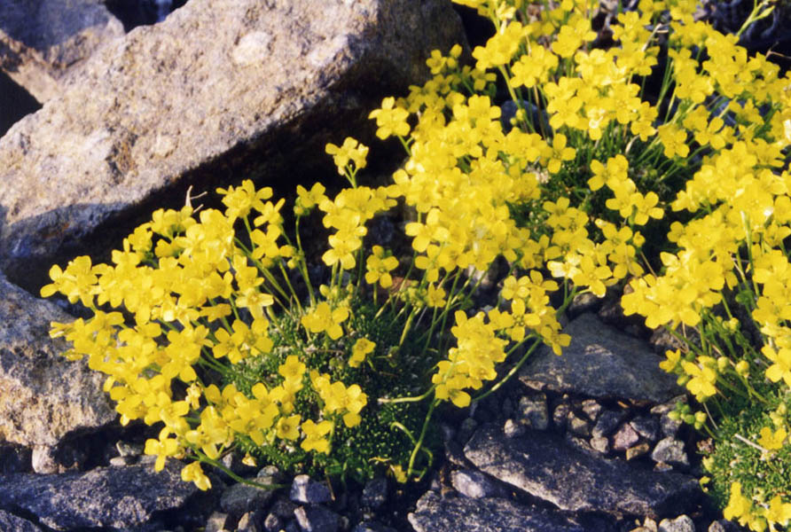 Draba rigida var. bryoides